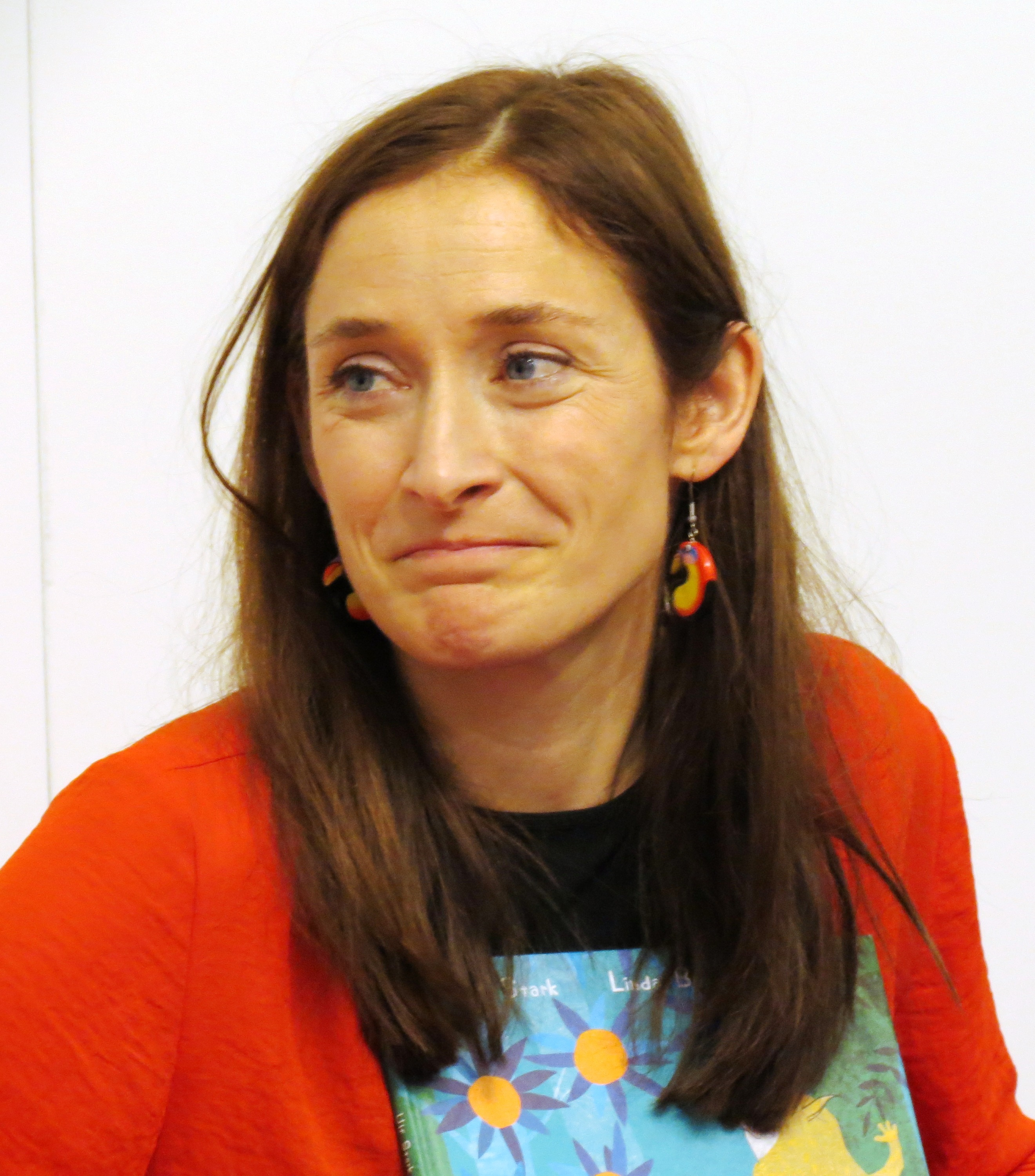 Linda Bondestam på Bokmässan i Göteborg 2016. I famnen håller hon Ulf Starks bilderbok "Djur som ingen sett utom vi" som hon själv illustrerat.